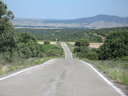 Carretera a Rubielos de la Cérida